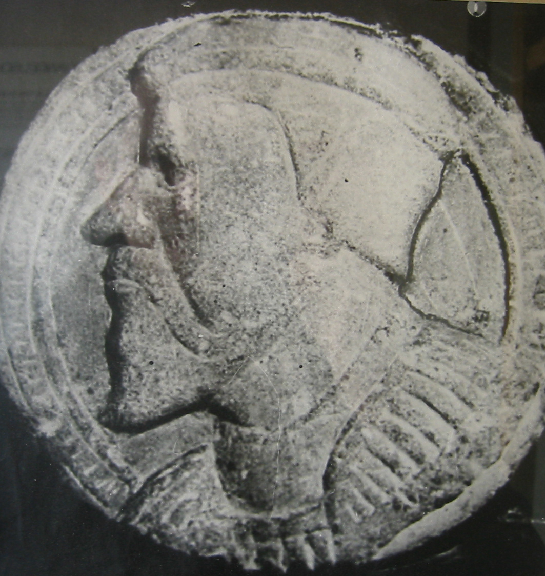 Johann Schwebel, german church reformer